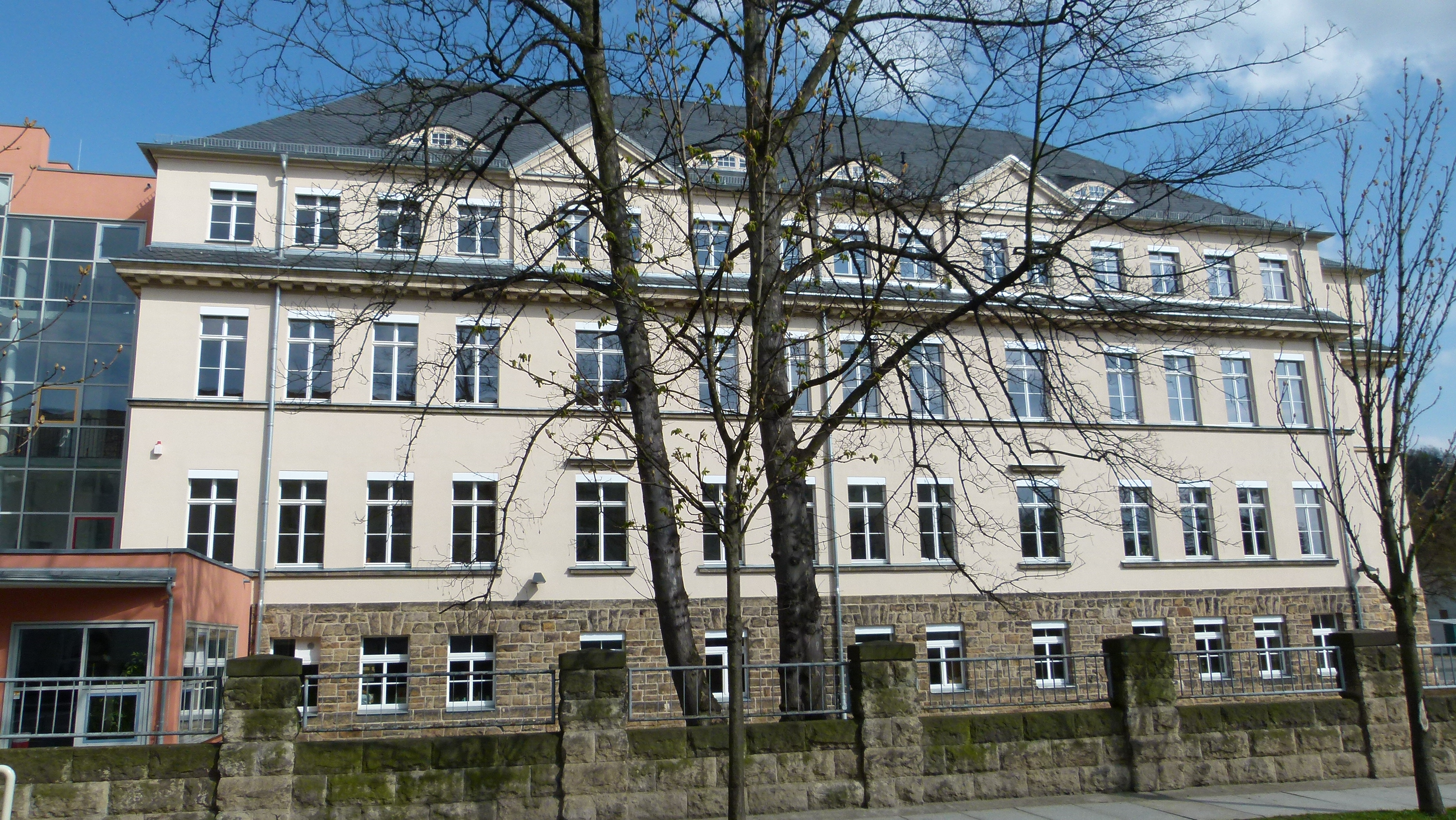 Schiller-Gymnasium, Denkmalgeschützter Häuserkomplex, Seminarstrasse 3, Pirna